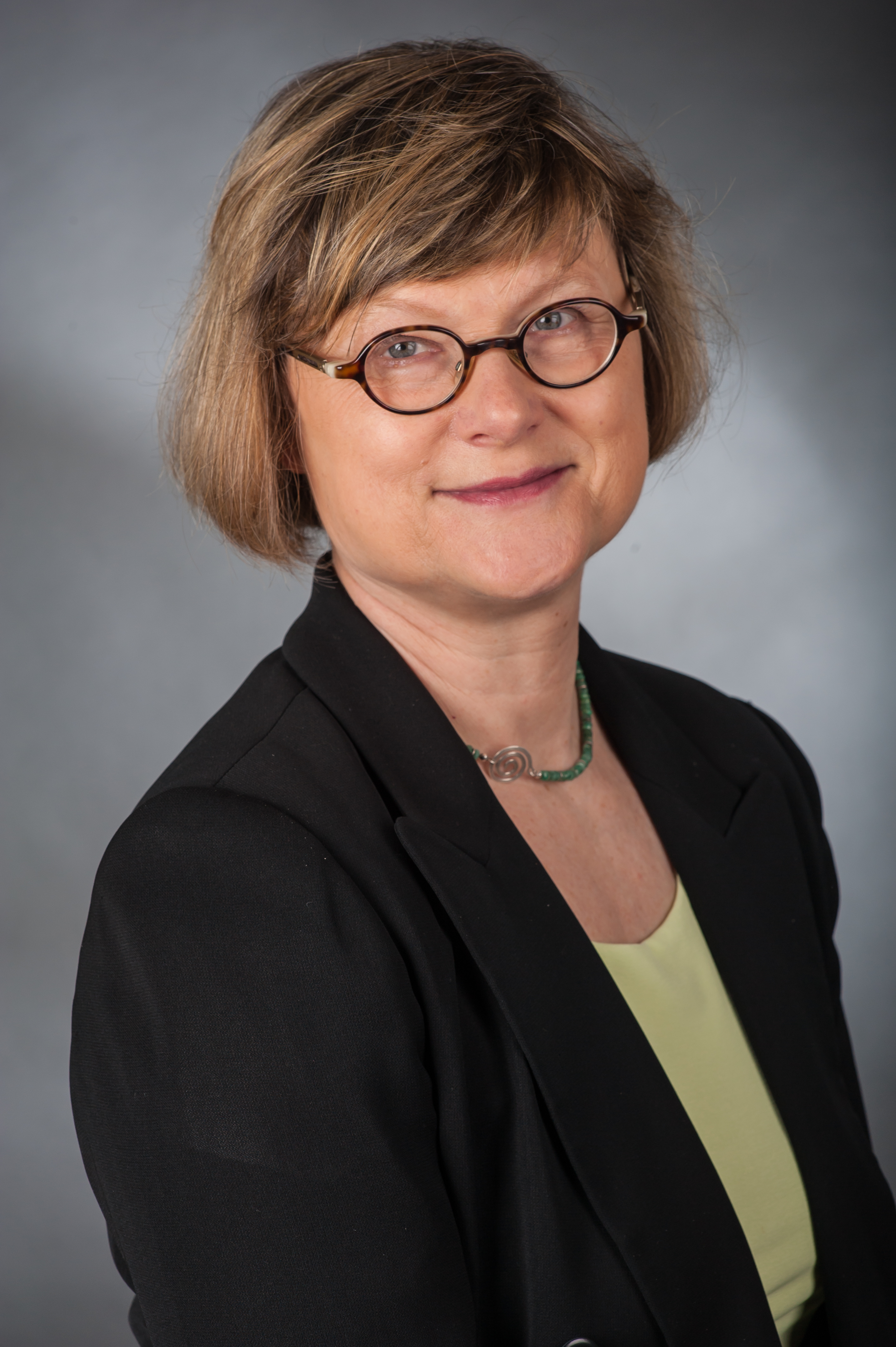 Antje Niewisch-Lennartz, Niedersächsische Justizministerin. Wikipedia im Landtag – Niedersachsen 17. bis 18. April 2013 in Hannover Personality rights warningAlthough this work is freely licensed or in the public domain, the person(s) shown may have rights that legally restrict certain re-uses unless those depicted consent to such uses. In these cases, a model release or other evidence of consent could protect you from infringement claims.